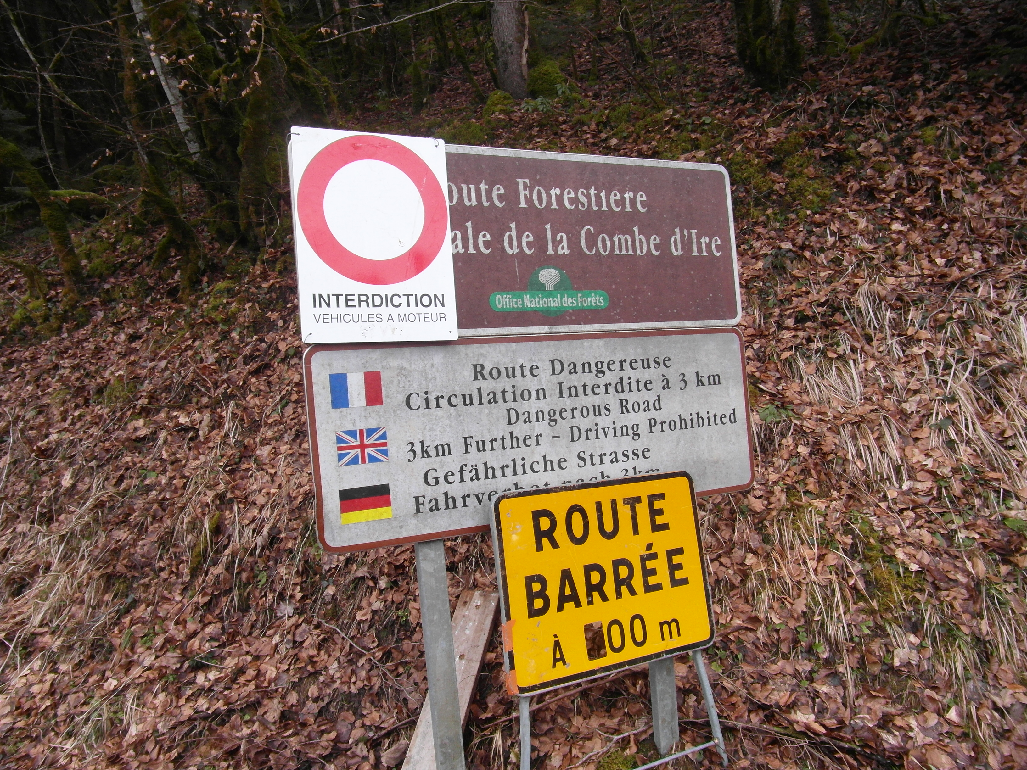 panneau indicateur de la combe d'Ire